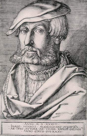 Генрих Альдегревер